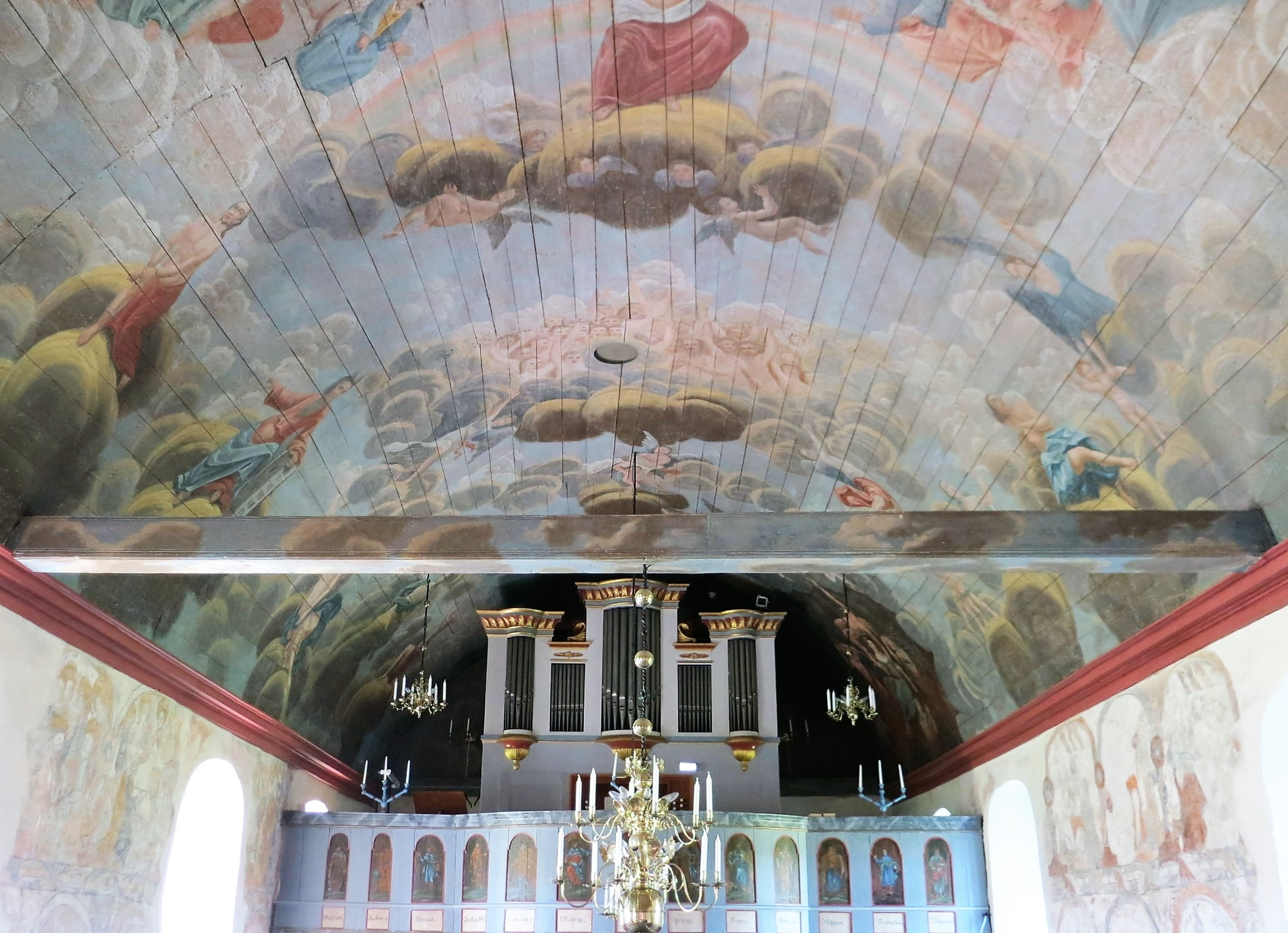 Stråvalla kyrka, takmålning